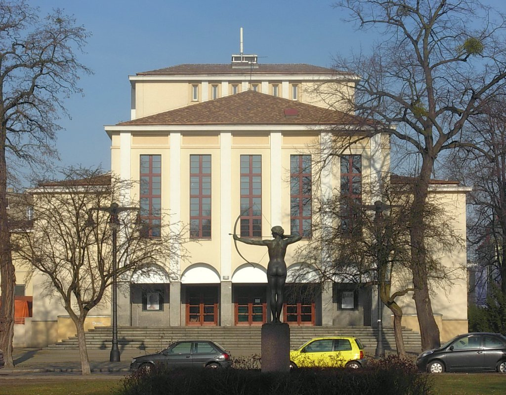 Łuczniczka w parku Jana Kochanowskiego przed Teatrem Polskim w Bydgoszczy